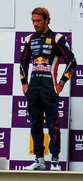 (cropped)Podium : 1) Alexander Rossi ; 2) Daniel Ricciardo ; 3) Jean-Éric Vergne - 2011 Formula Renault 3.5 Series - Circuit Paul Ricard - Race 2